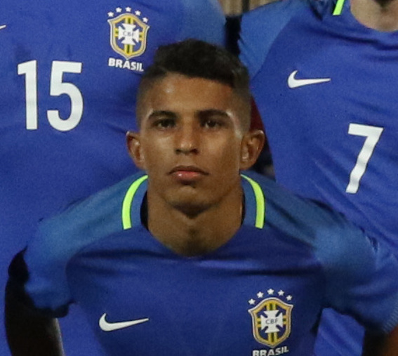 Riobamba, Ecuador, 18 enero 2017 (Andes).- El combinado ecuatoriano dirigido por Javier Rodríguez cayó 1-0 este miércoles ante Brasil en el marco de la primera jornada del Grupo A del Campeonato Sudamericano Sub 20 Ecuador 2017, durante el partido jugado en el estadio Olímpico de Riobamba (centro andino), abarrotado de hinchas. ANDES/Micaela Ayala V.